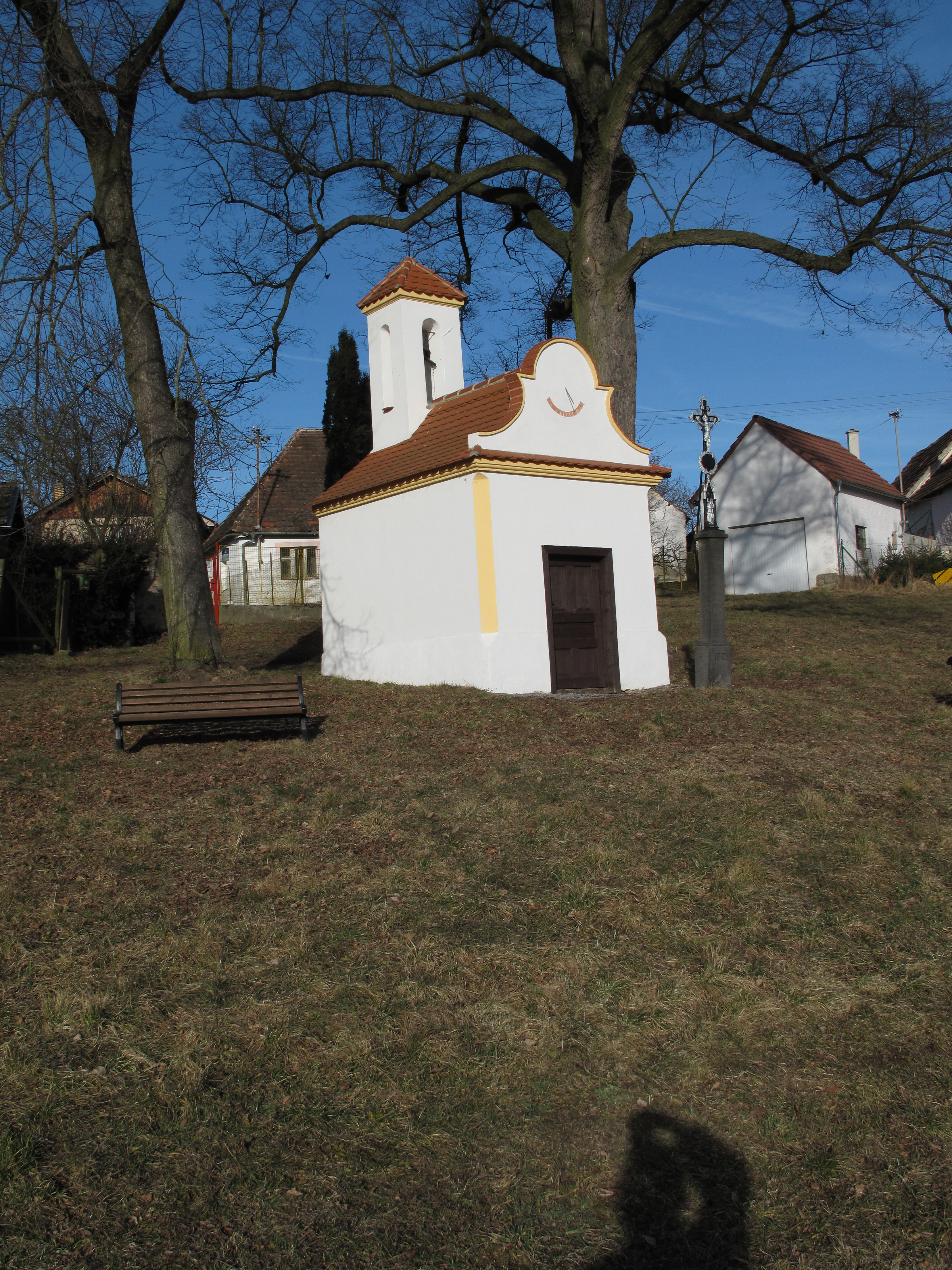 Kaplička v Záluží. Okres Strakonice, Česká republika.